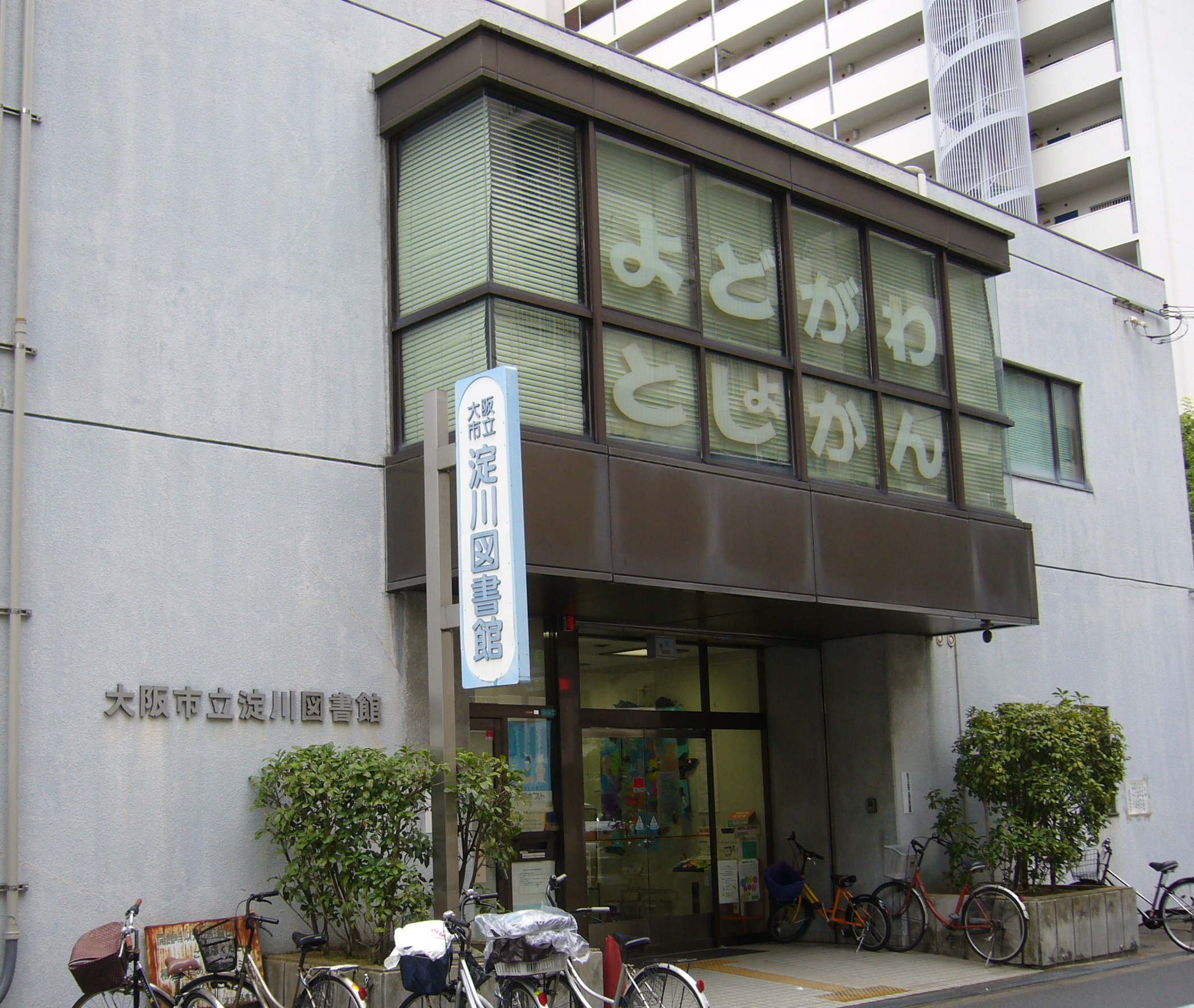 大阪市立淀川図書館